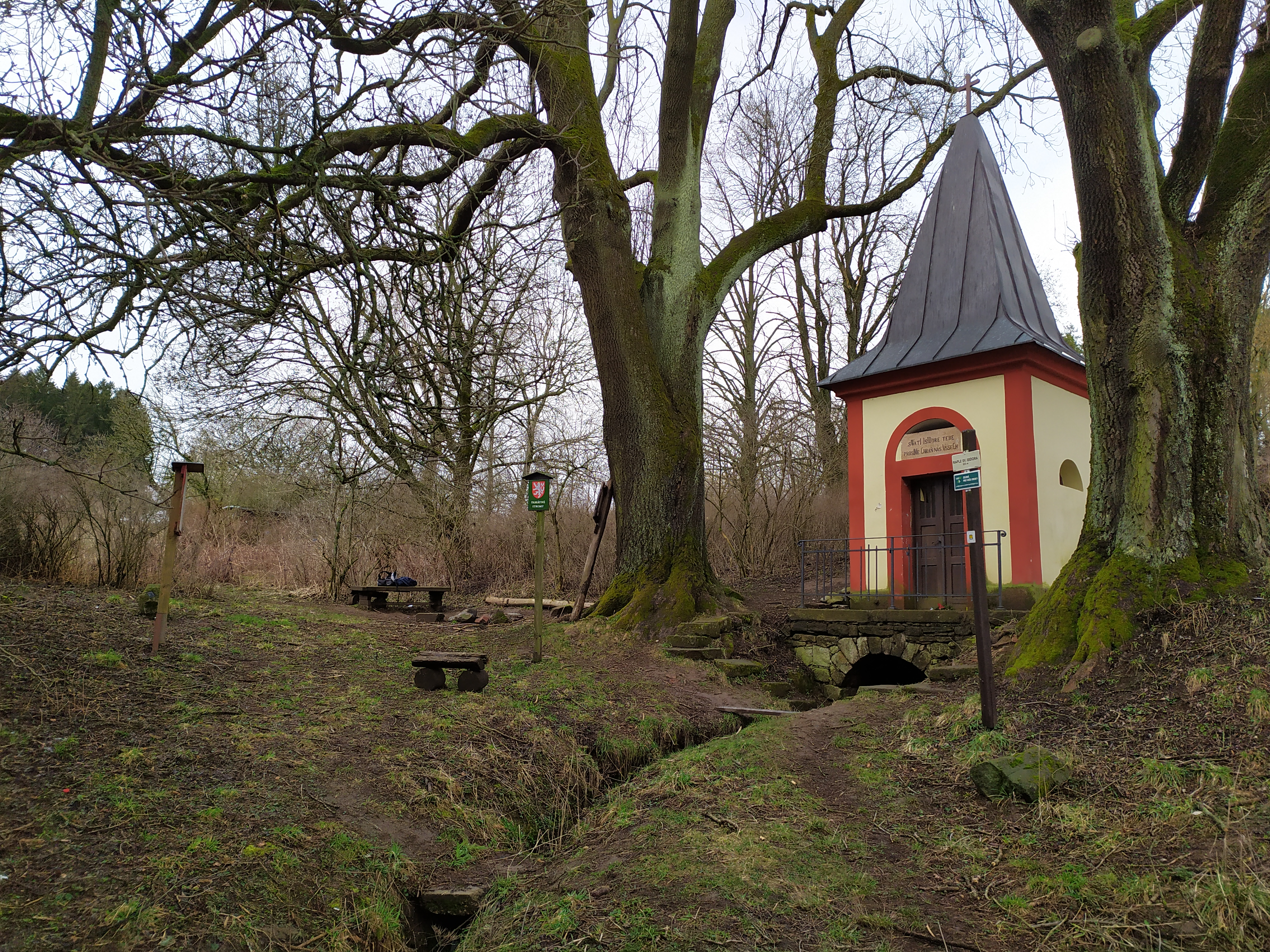 Kaple svatého Isidora s okolím